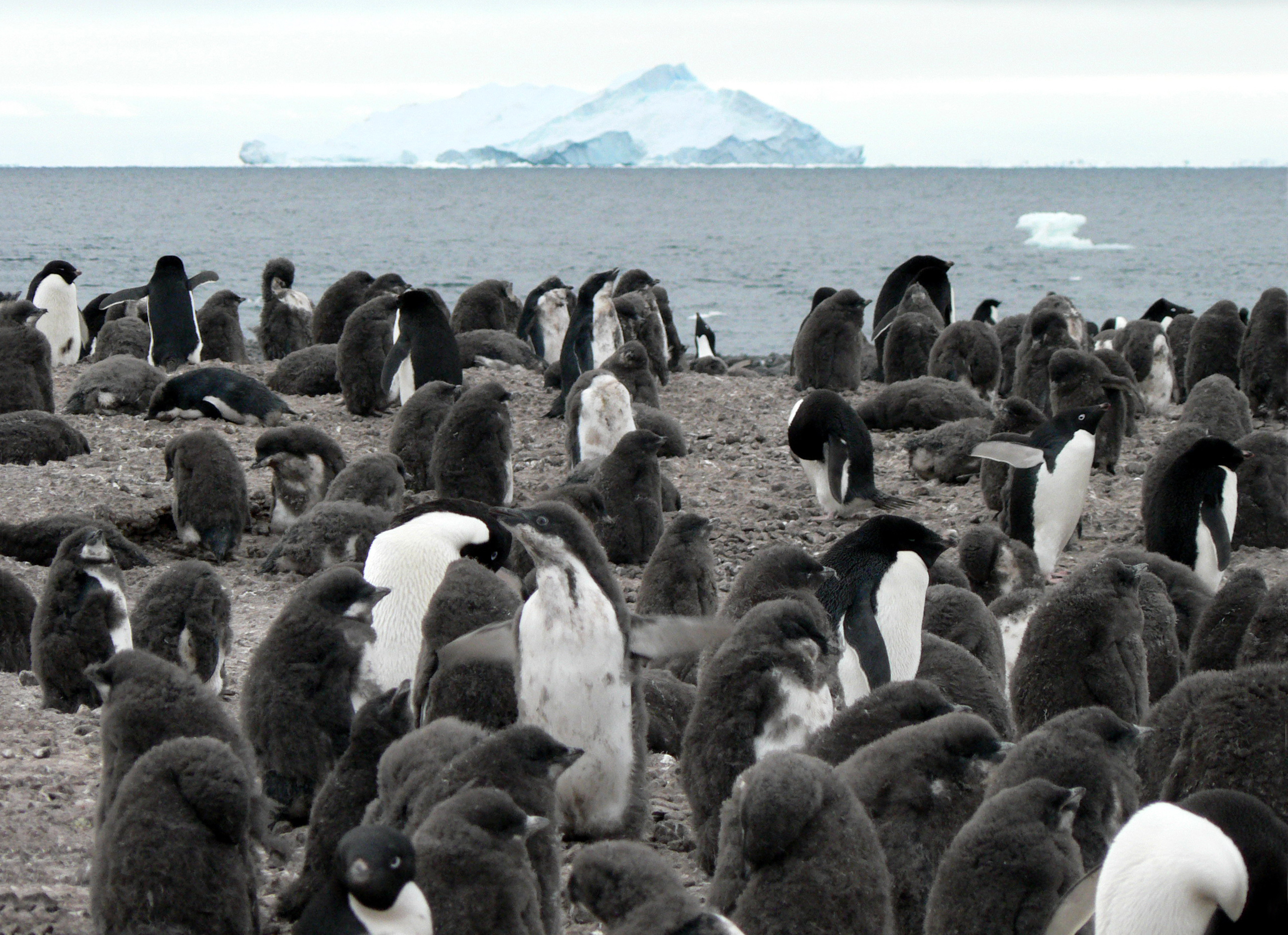 Franklin island